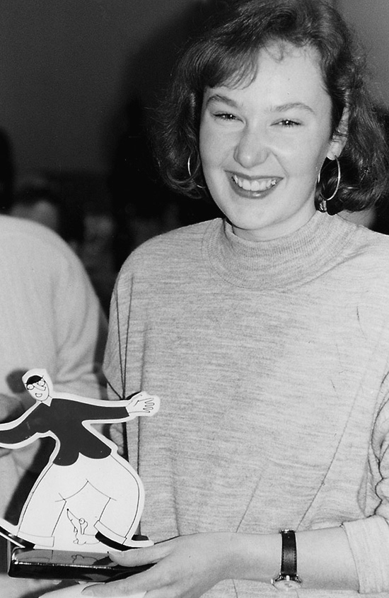 la fumettista Silvia Ziche col premio Bonaventura a Treviso Comics nel 1993, foto Joe Zattere (Fumetti d'Italia)